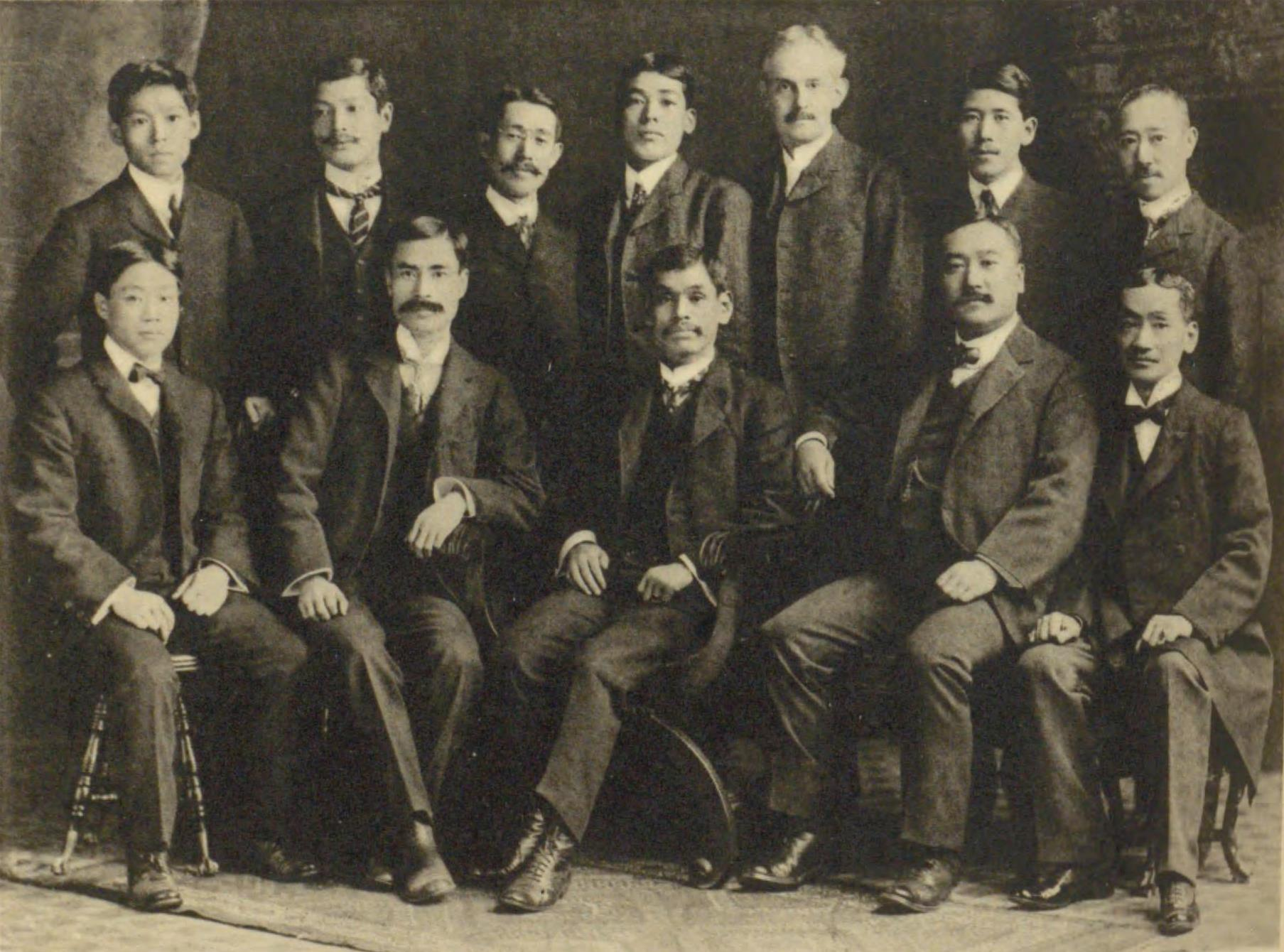 明治37年山中商会ニューヨーク支店員一同 下段中央山中定次郎